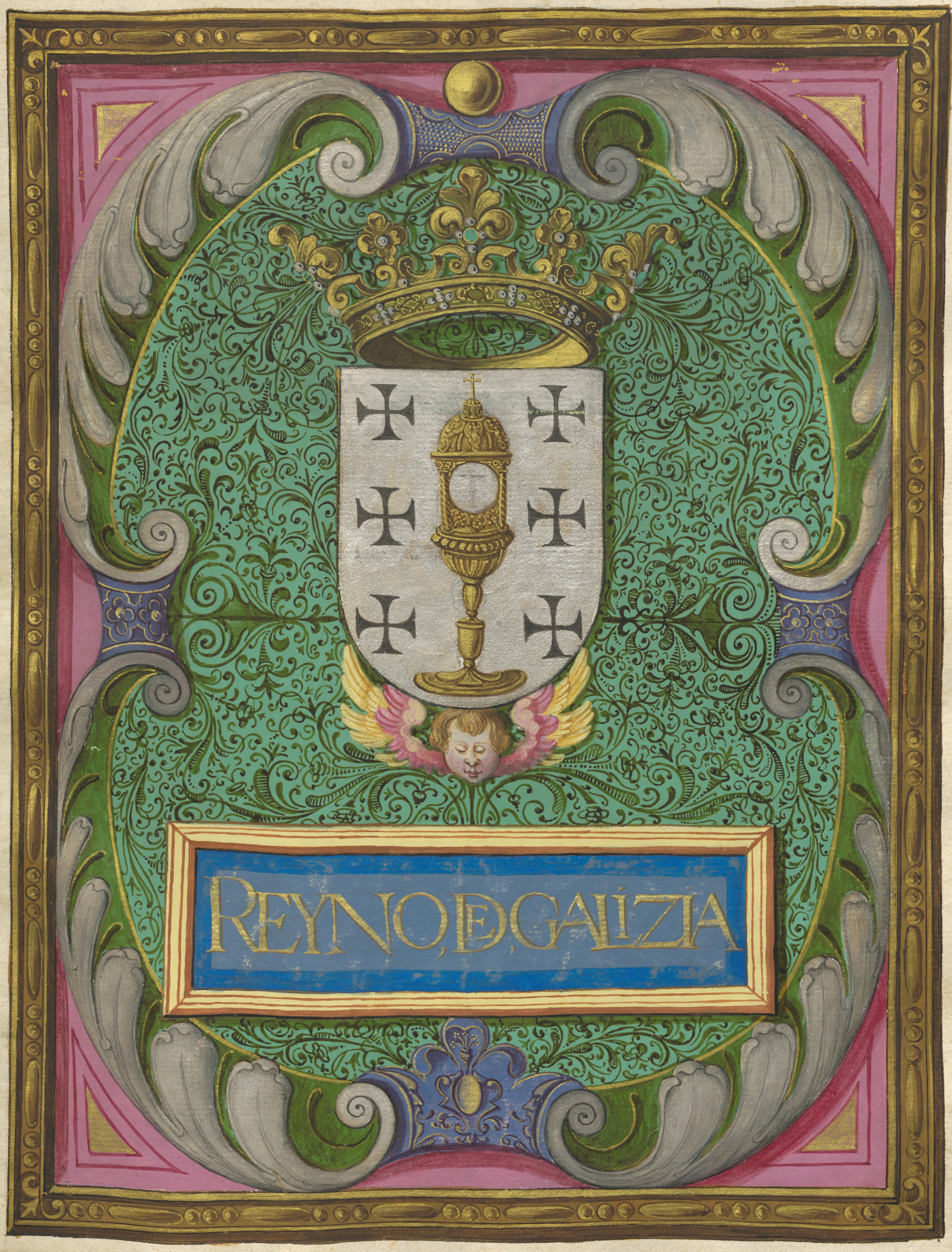 da obra "Descripción de la costa del reyno de Galizia", cartografía realizada por Pedro de Teixeira Albernas arredor de 1625.